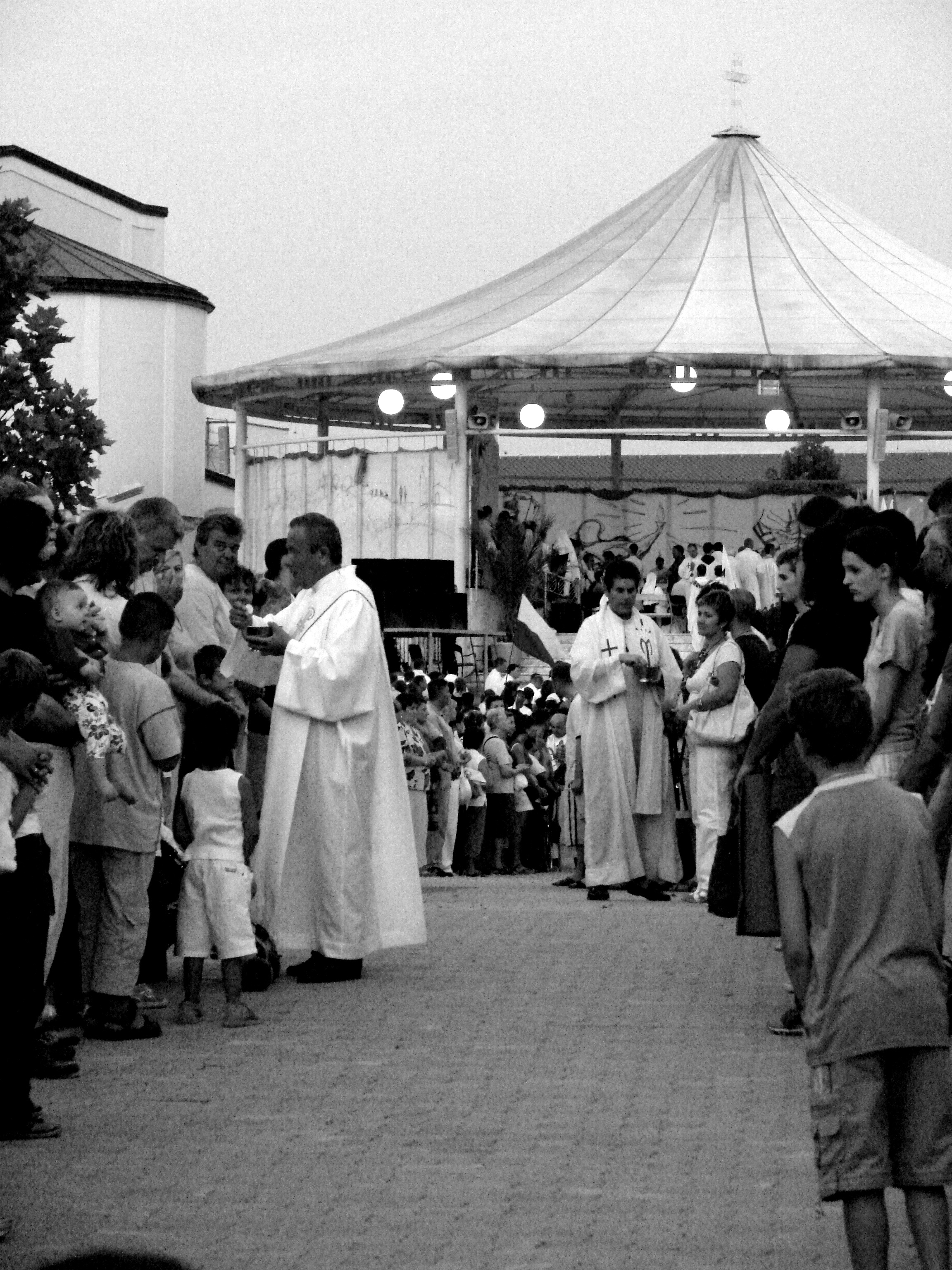 Miejscowość w Bośni i Hercegowinie położona w południowej części Hercegowiny na południowy zachód od Mostaru.